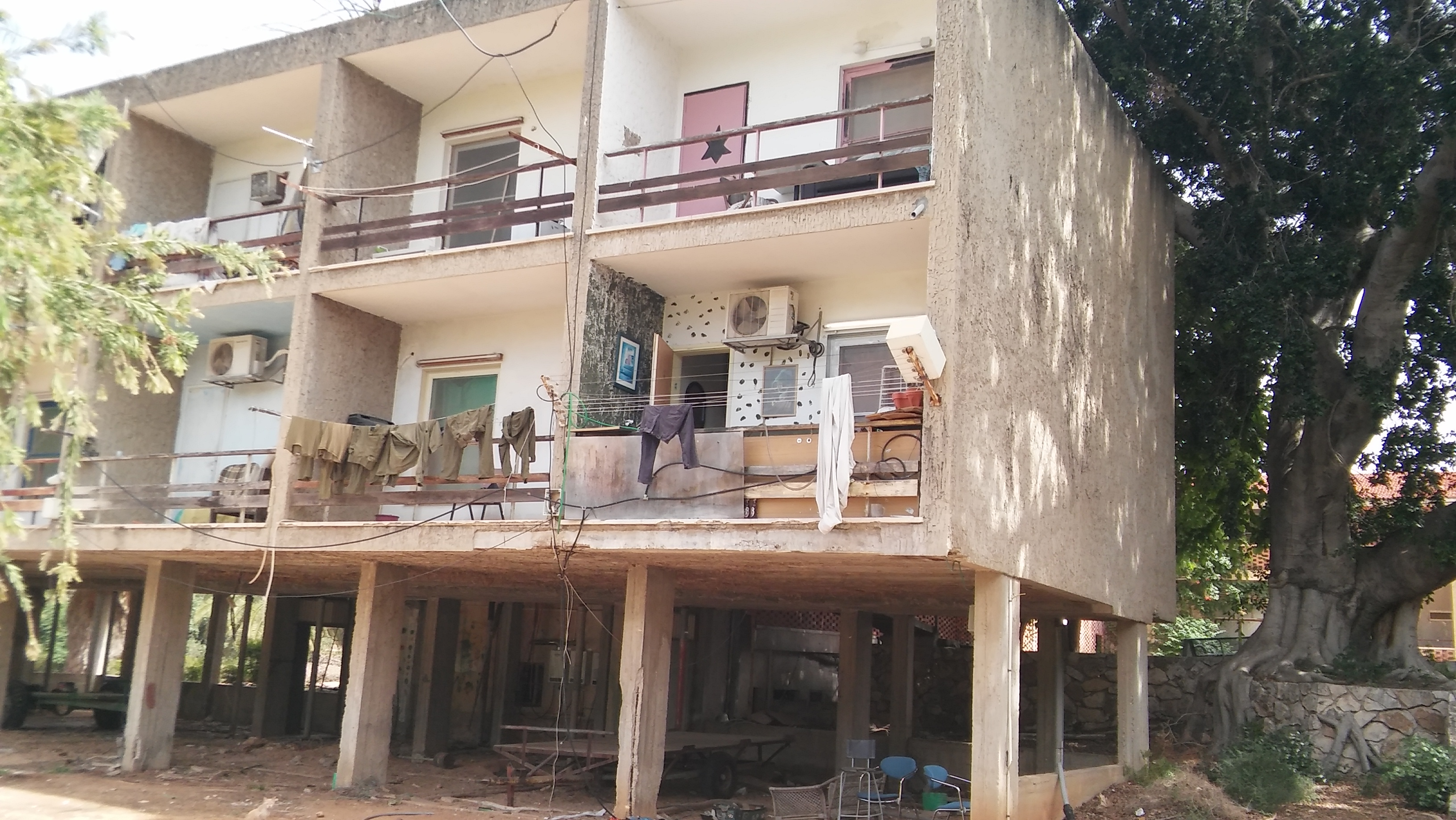 בית ישע גבעת ברנר